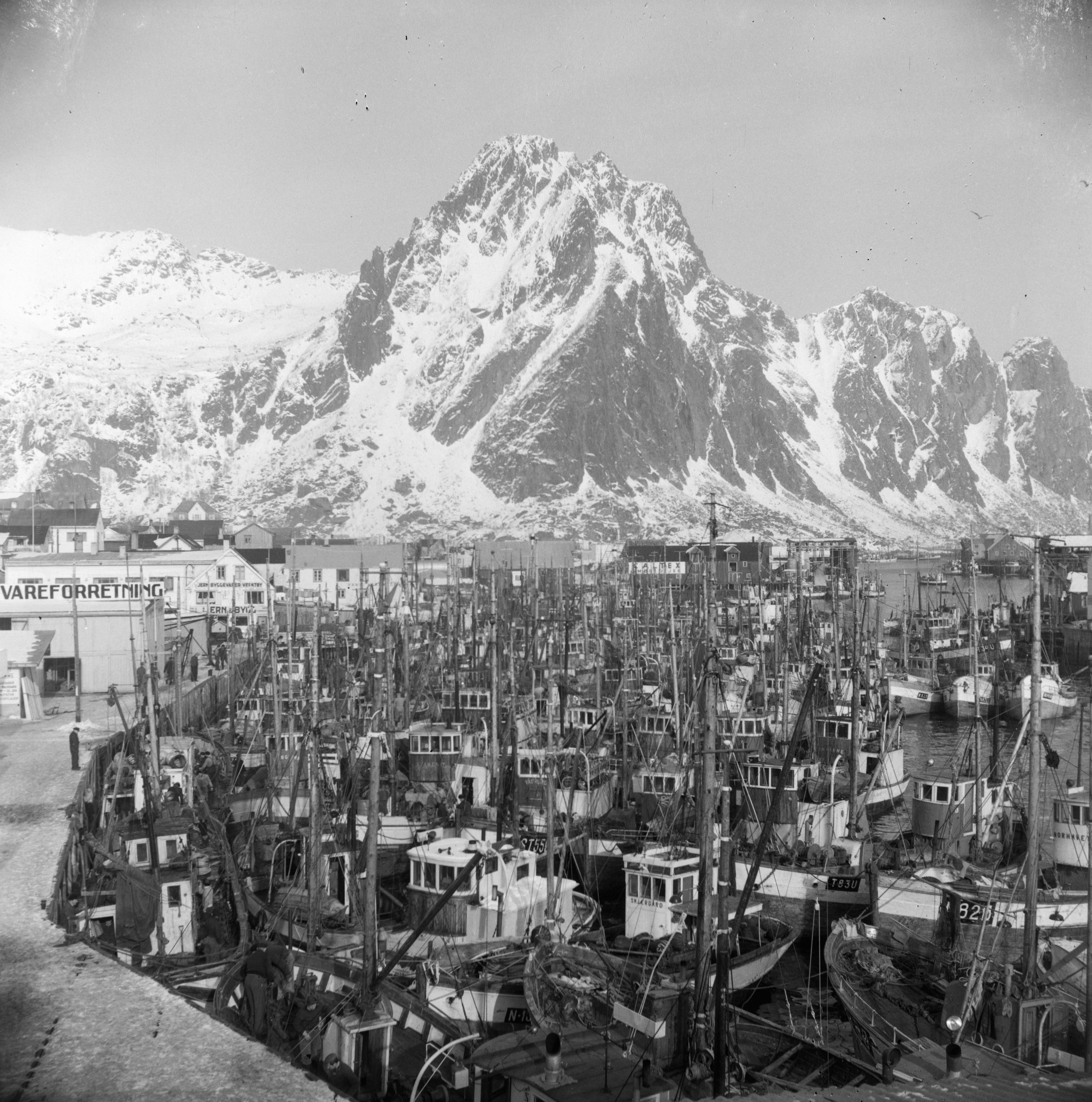 Bildet er hentet fra Nordlandsmuseet bildesamling etter Kanstad. Motivbeskrivelse: Svolvær havn; båter Sted: Svolvær Nøkkelord: Topografi og geologi Båter og fartøyer Havnevesen